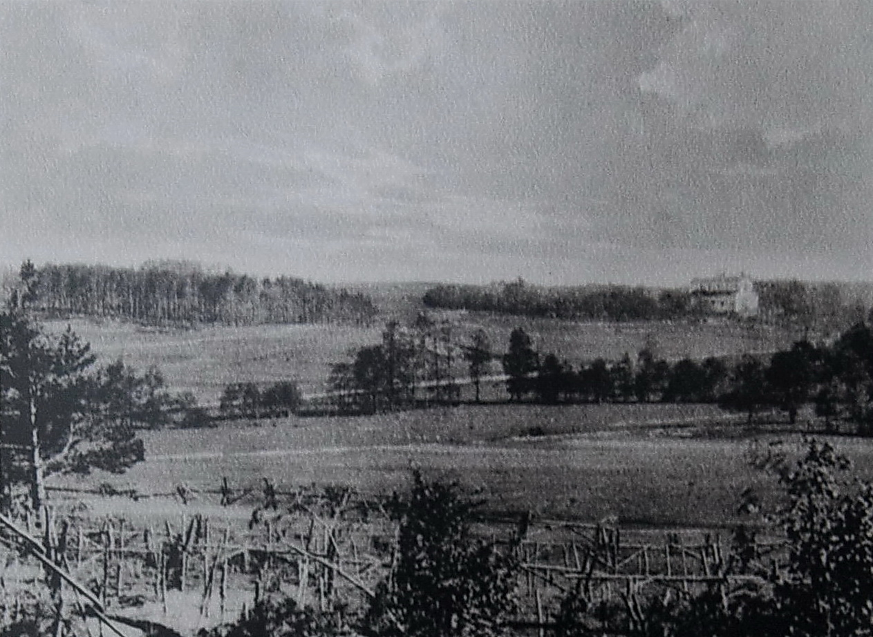 Беларуская (тарашкевіца): Наваспаск (Navaspask) або Суцькаў (Sućkaŭ). Базылянскі манастыр з Спаскай царквой